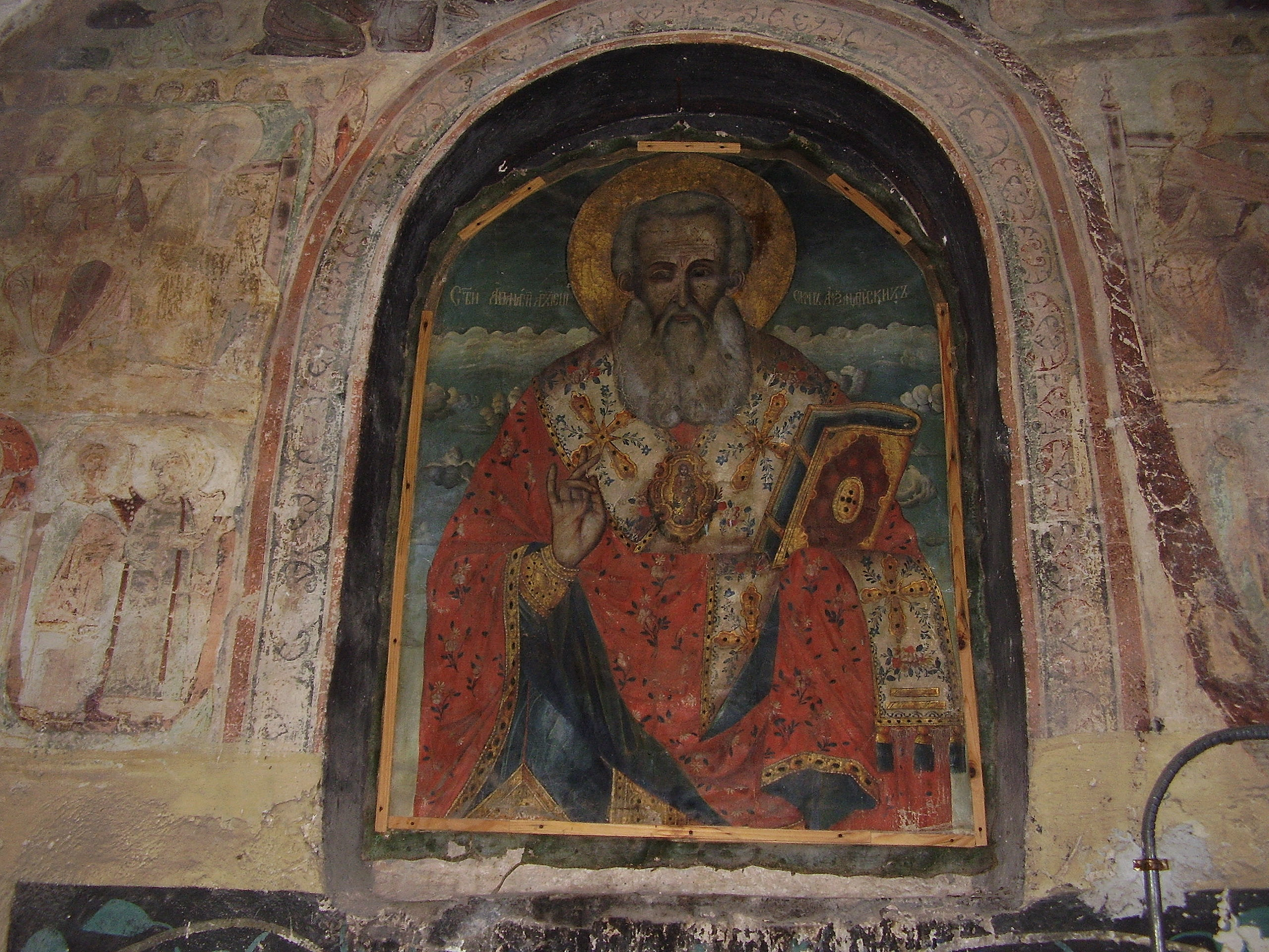 Свети Атанасий - икона в патронната ниша на западната фасада на църквата "Свети Атанасий" - гр.Бобошево